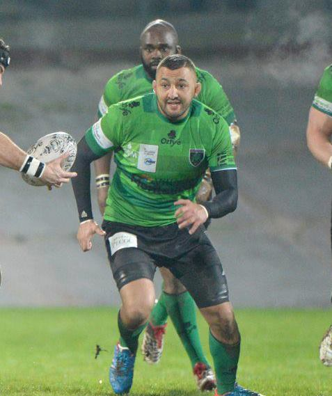 us montauban